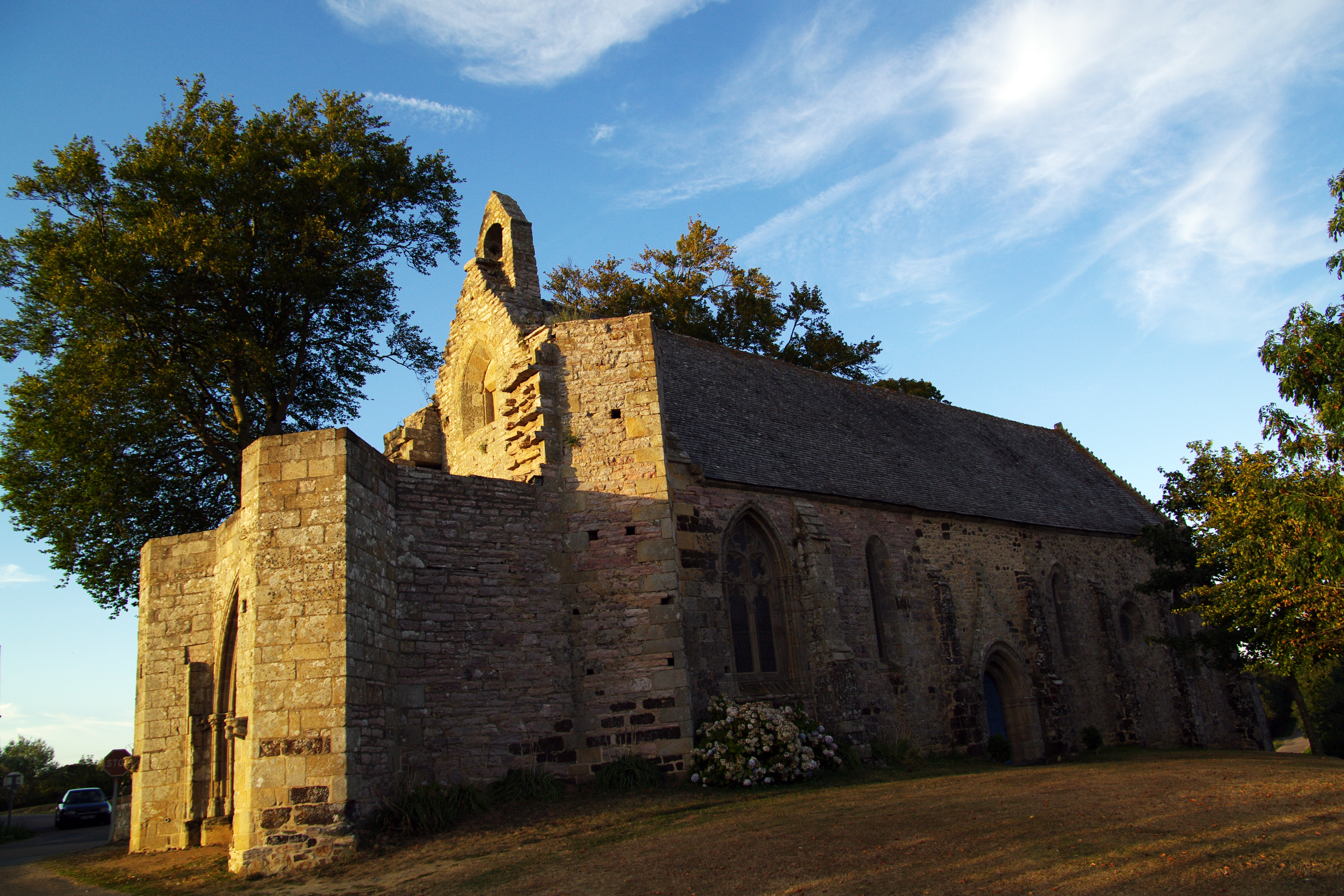 Chapelle Saint-Jacques-le-Majeur, (Classement, 1912) .